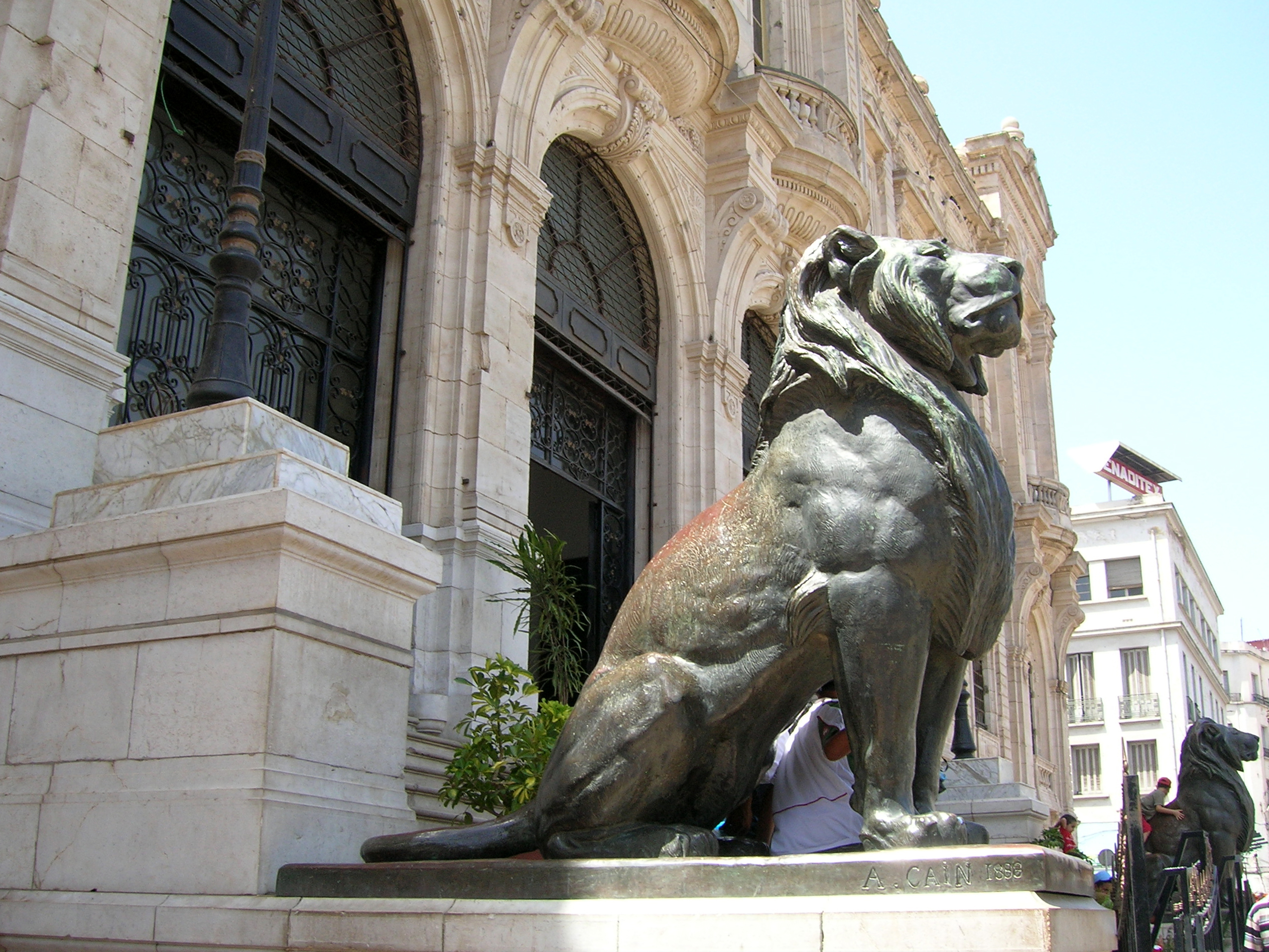 Les lions de l'Hôtel de ville d'Oran. Bronzes d'Auguste Cain, 1889.